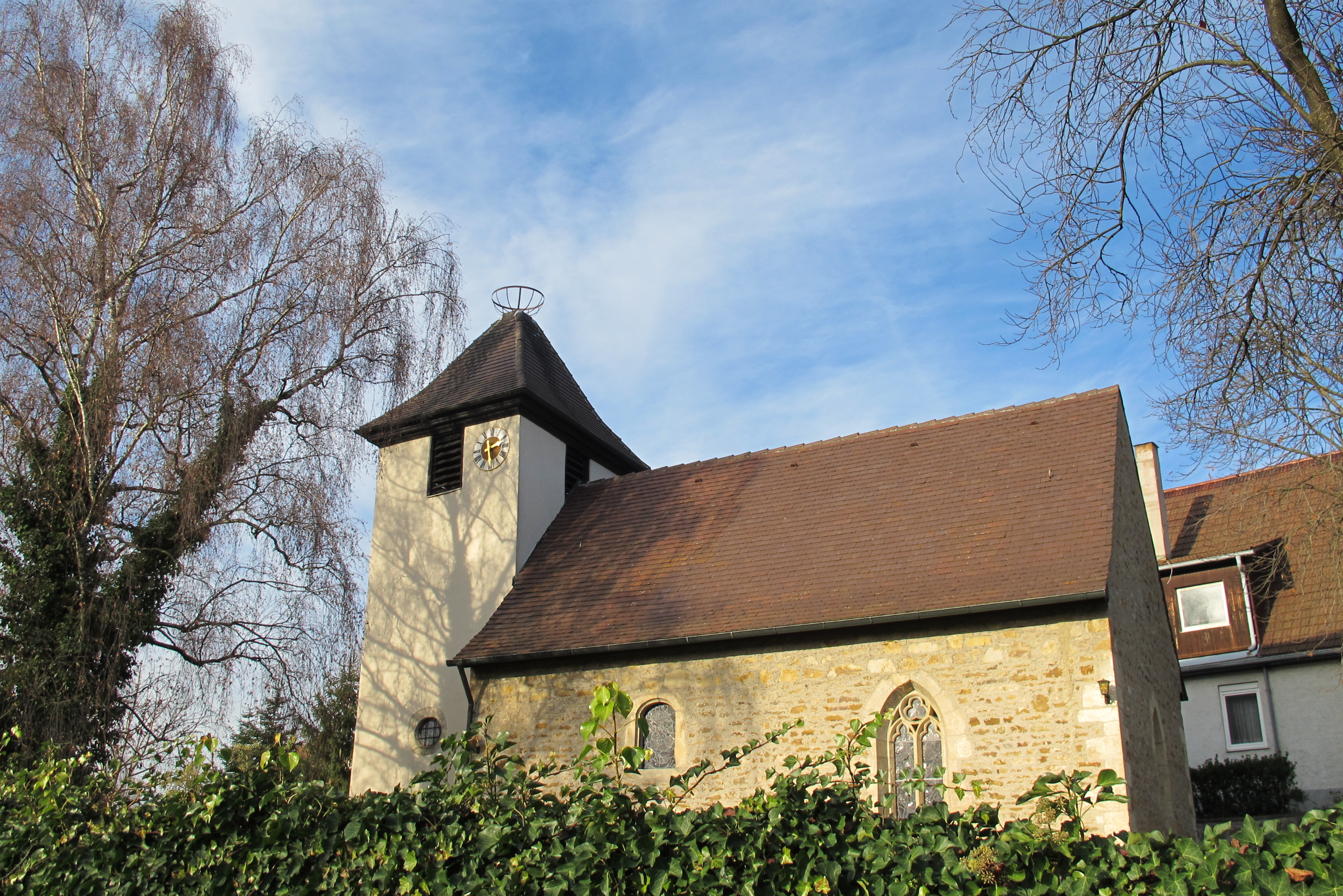 Bodelshofen (Wendlingen am Neckar). Die Jakobskirche befindet sich am Jakobsweg.